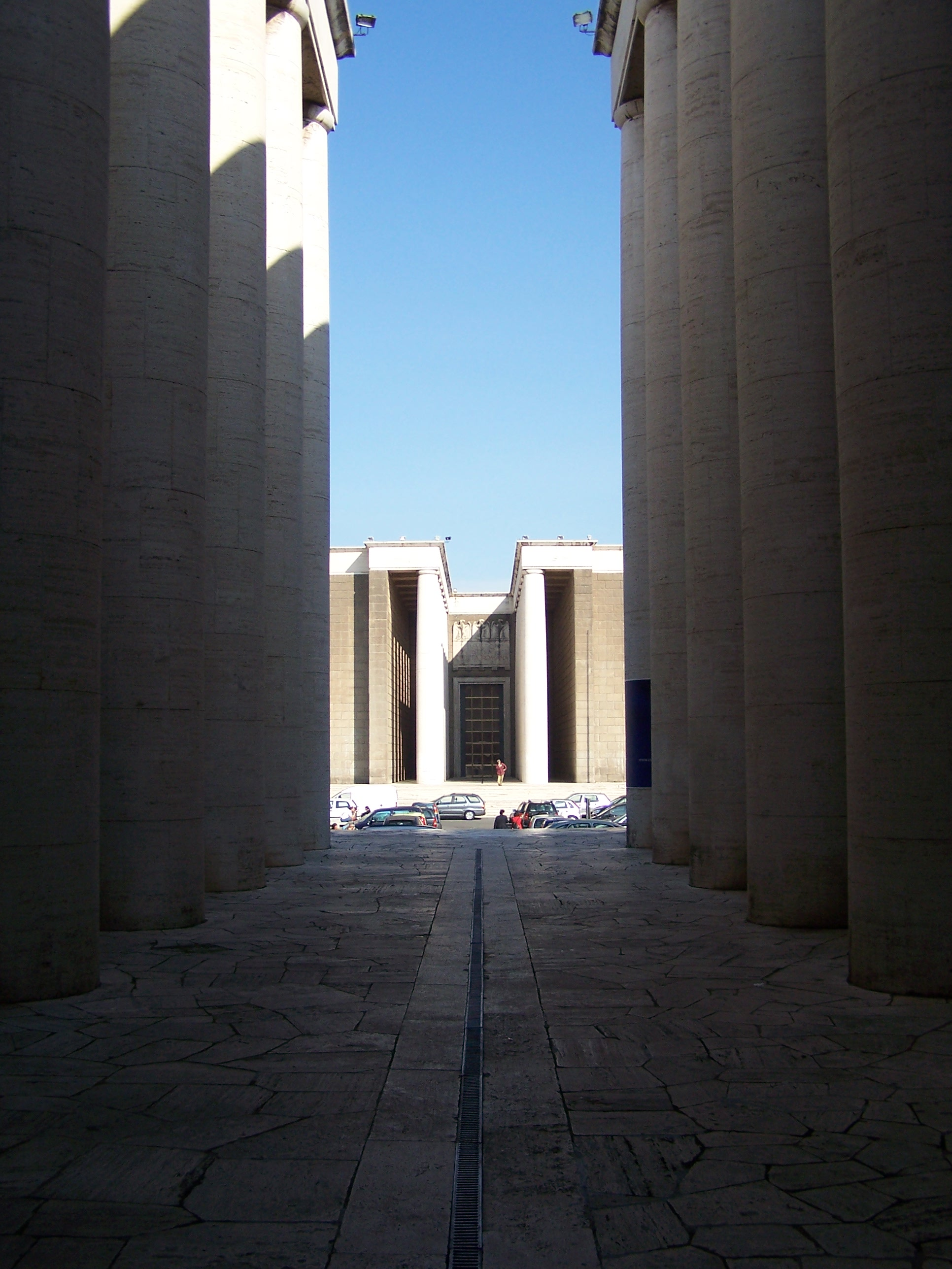 Museo della Civiltà Romana in de EUR, Rome. Eigen werk.